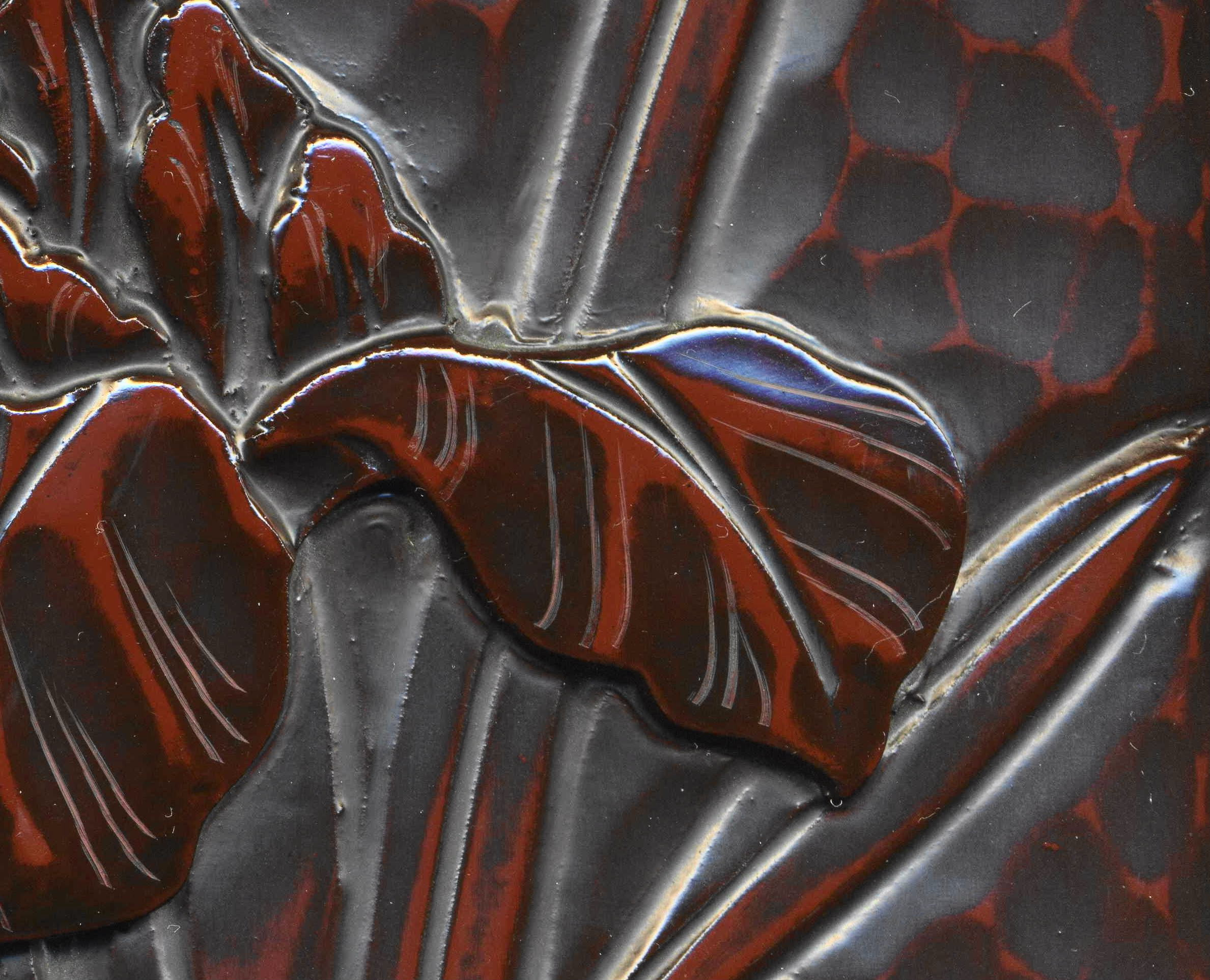 鎌倉彫（KamakuraBori.jpgの拡大図）